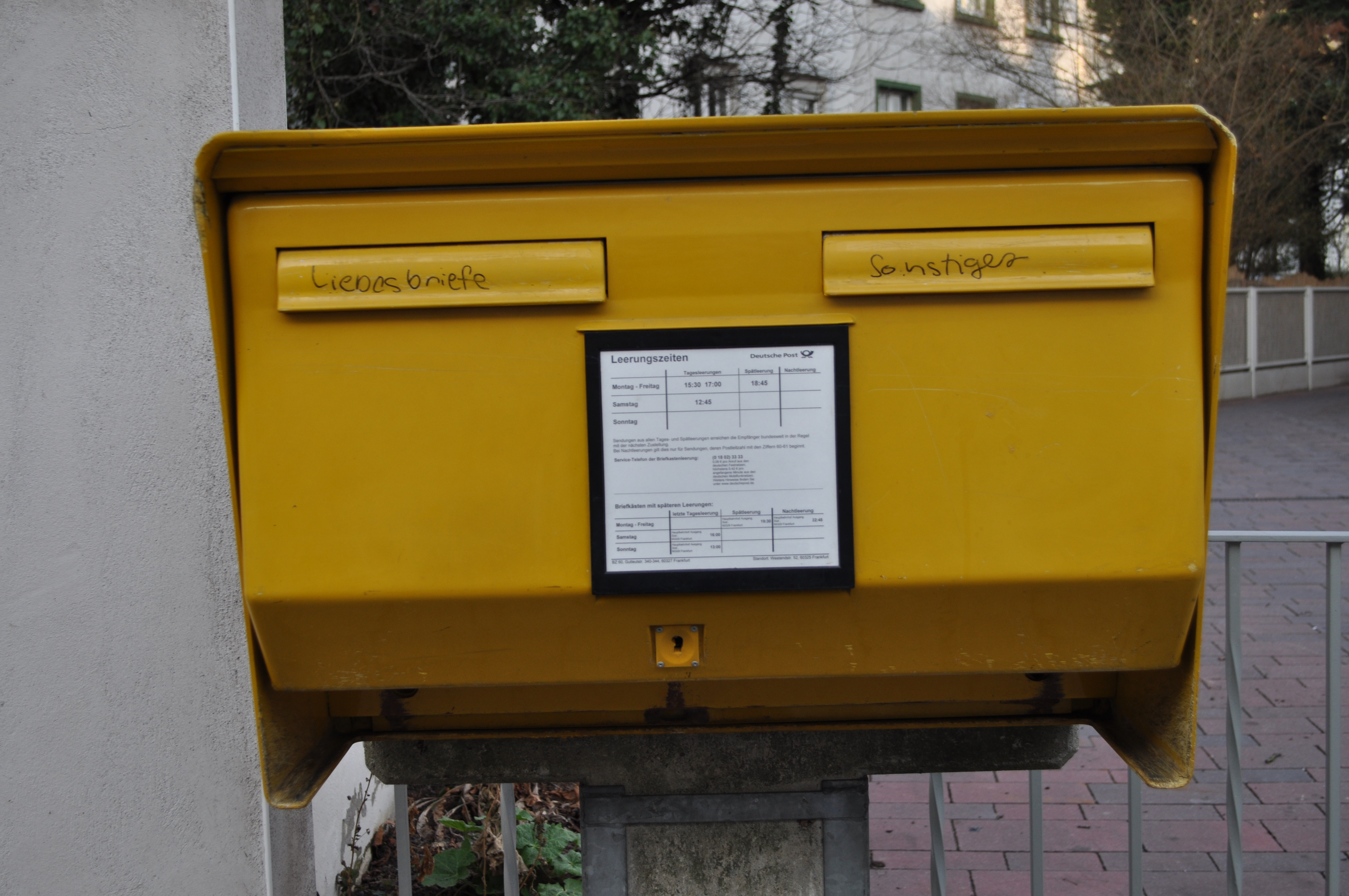 Briefkasten in Frankfurt am Main mit handschriftlicher Ergänzung "Liebesbriefe"